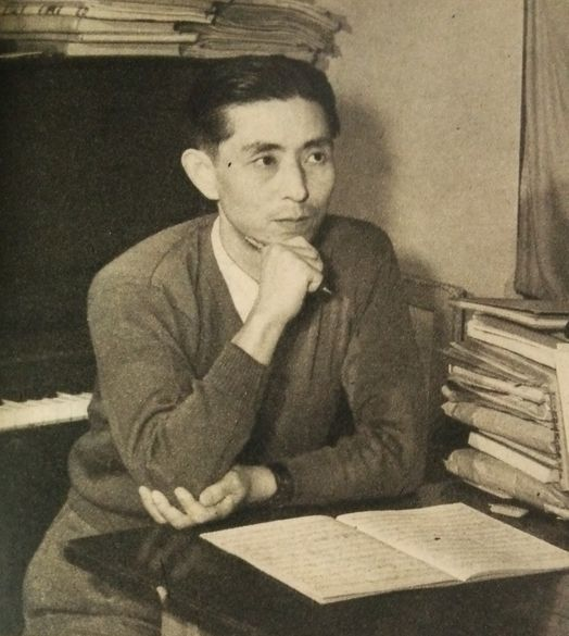 戸田邦雄